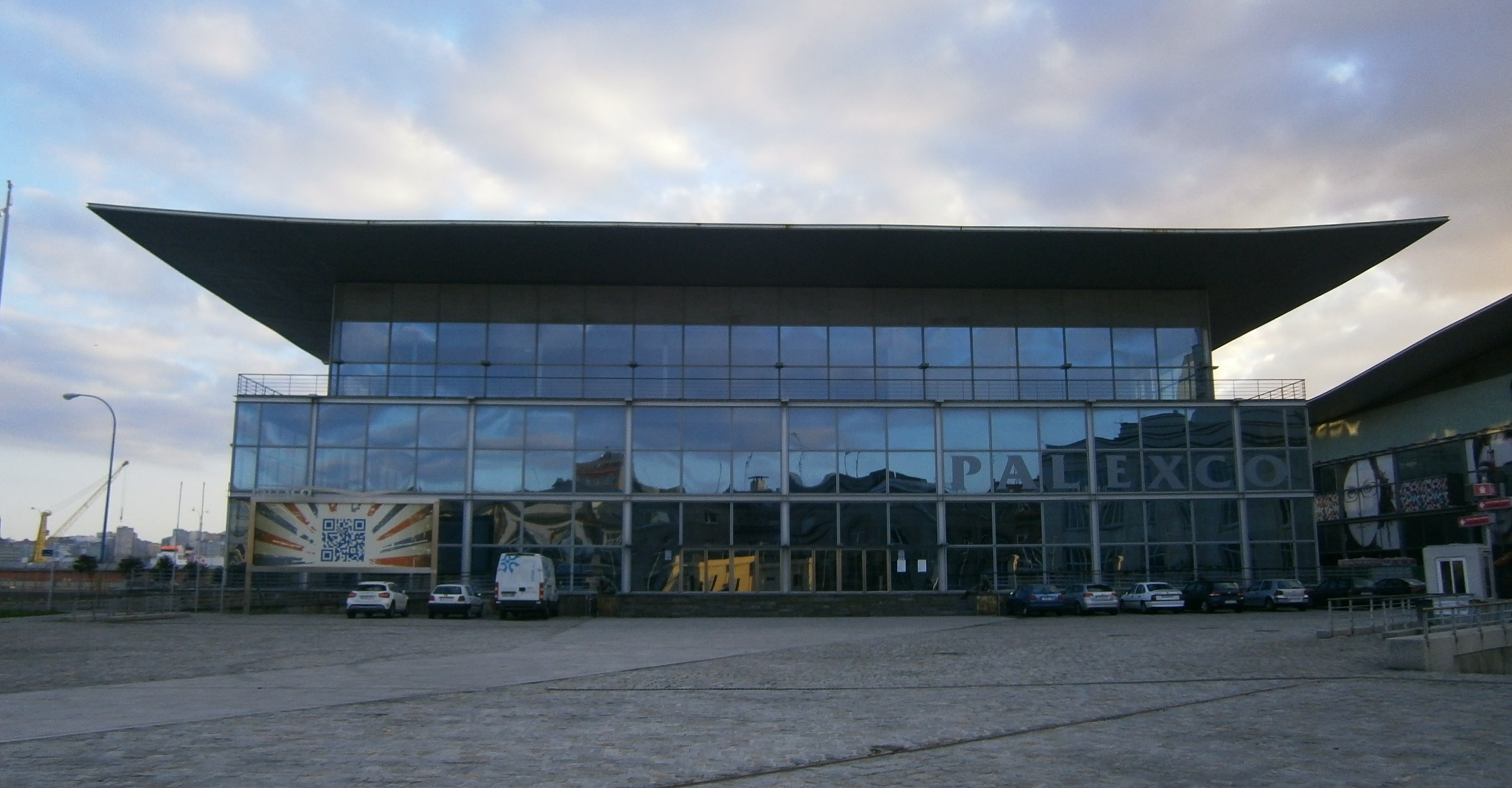 Fachada de Palexco (A Coruña)